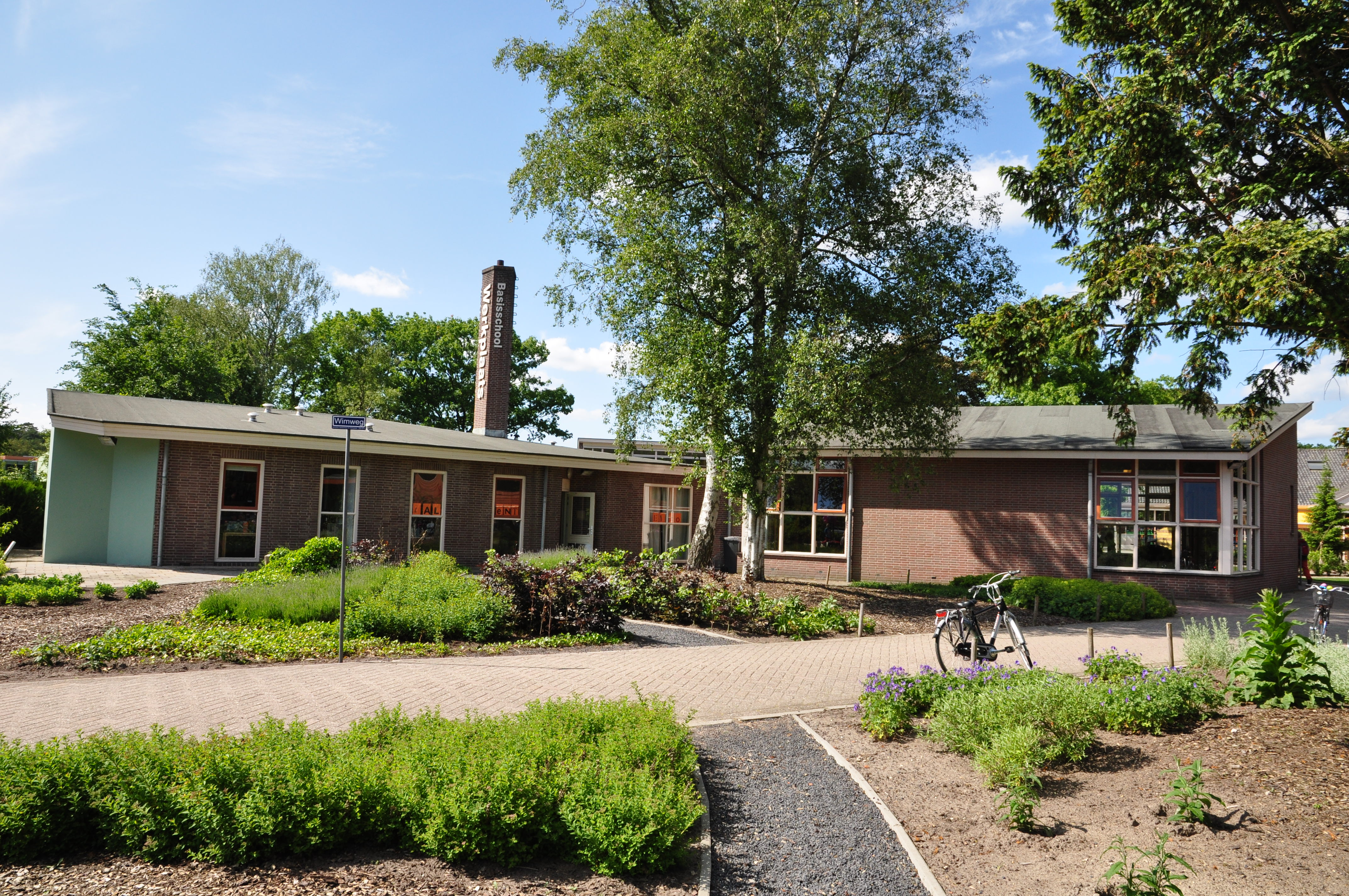 Werkplaats Kindergemeenschap in Bilthoven. Het onderwijs is gebaseerd op de pedagogische opvattingen van Kees Boeke.